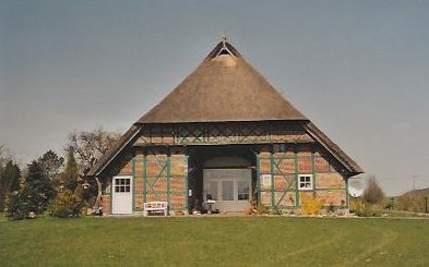 Das Stoffer'sche Haus in Thandorf - unter dem Dachfirst befindet sich der dreifache Bauerntanz, der das Haus aus architektonischer Sicht so interessant macht.